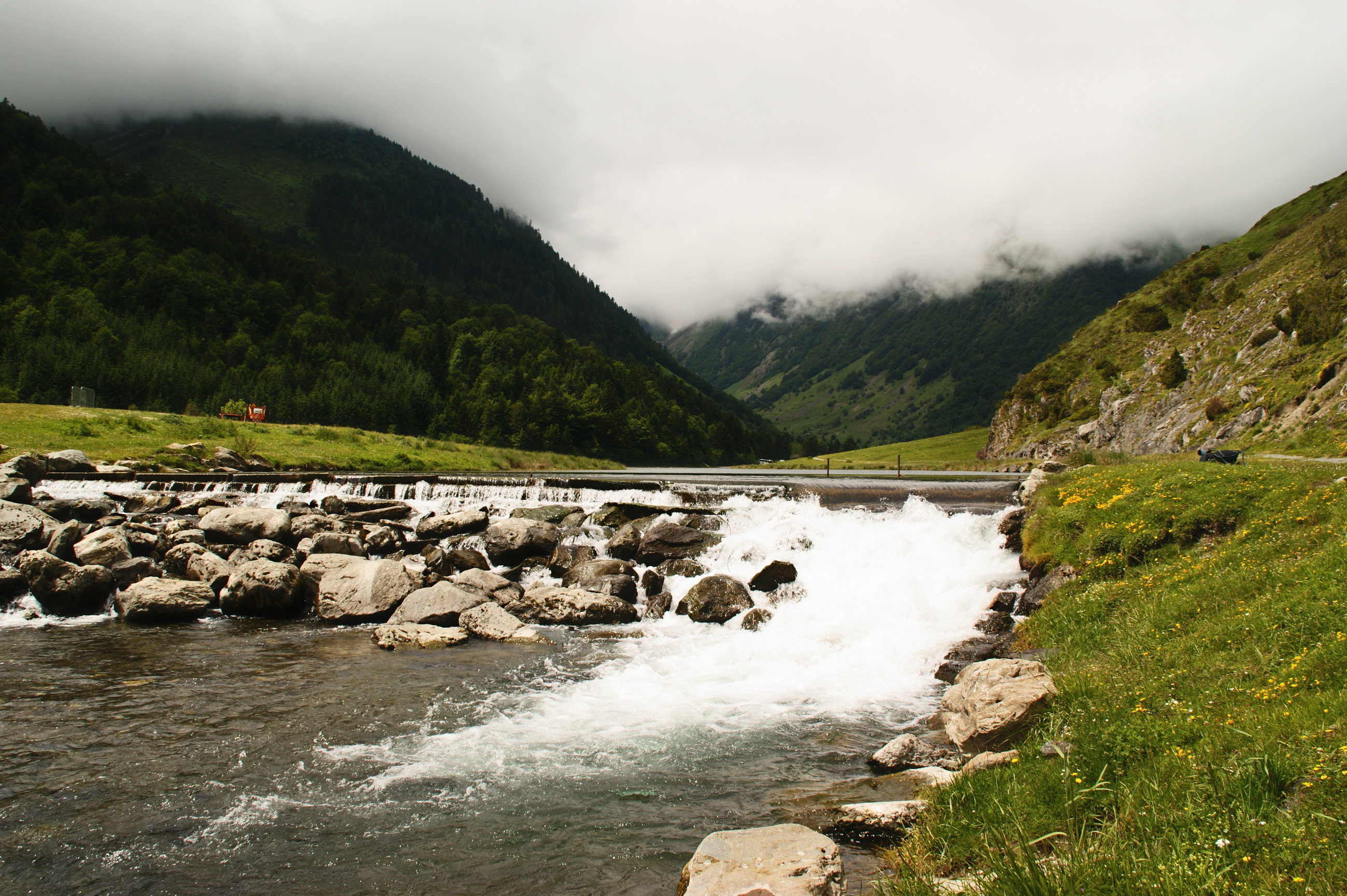 Gave de (River) Labat de Bun as it leaves in the Hautes-Pyrénées.